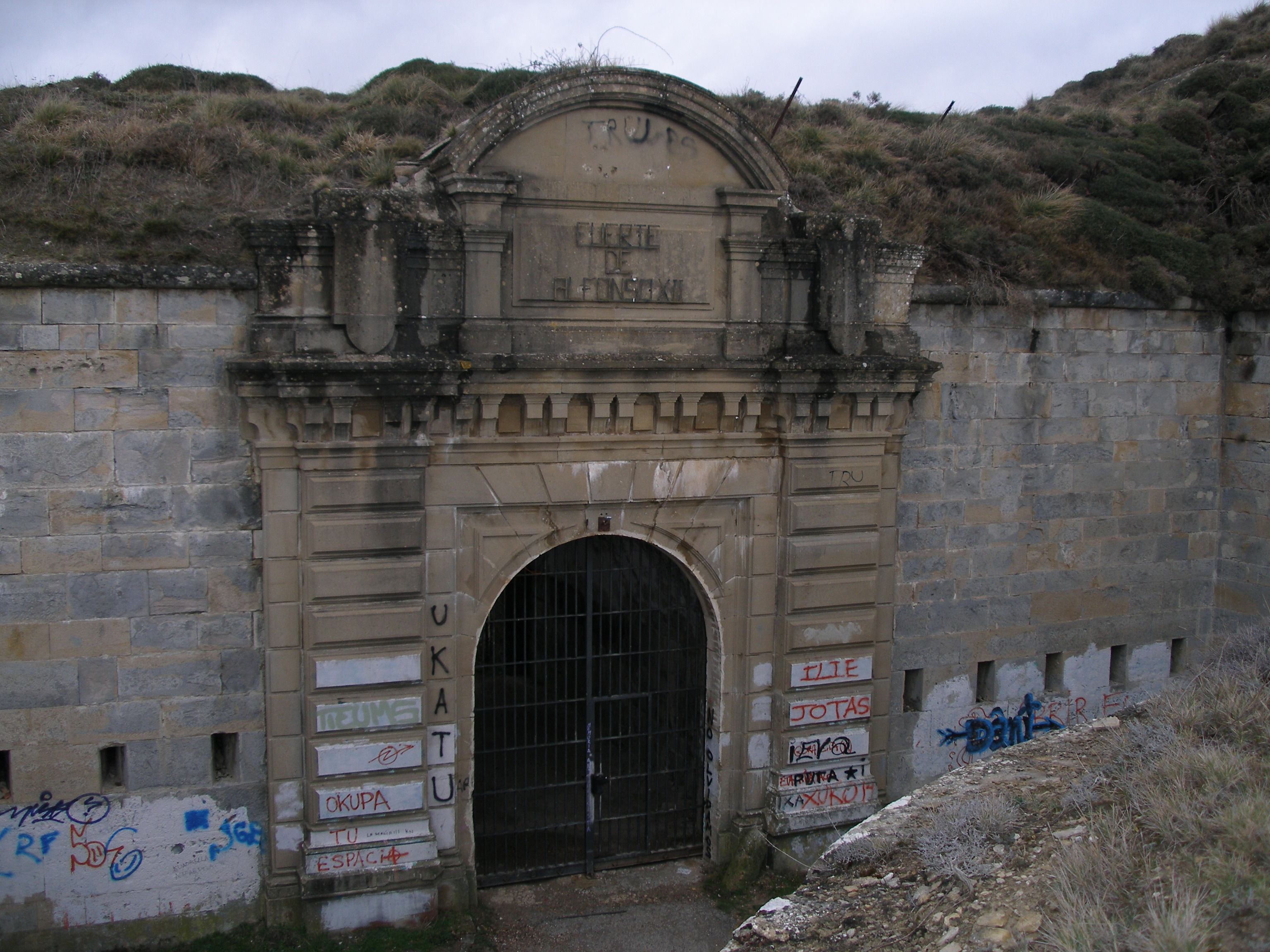 Entrada del Fuerte San Cristóbal